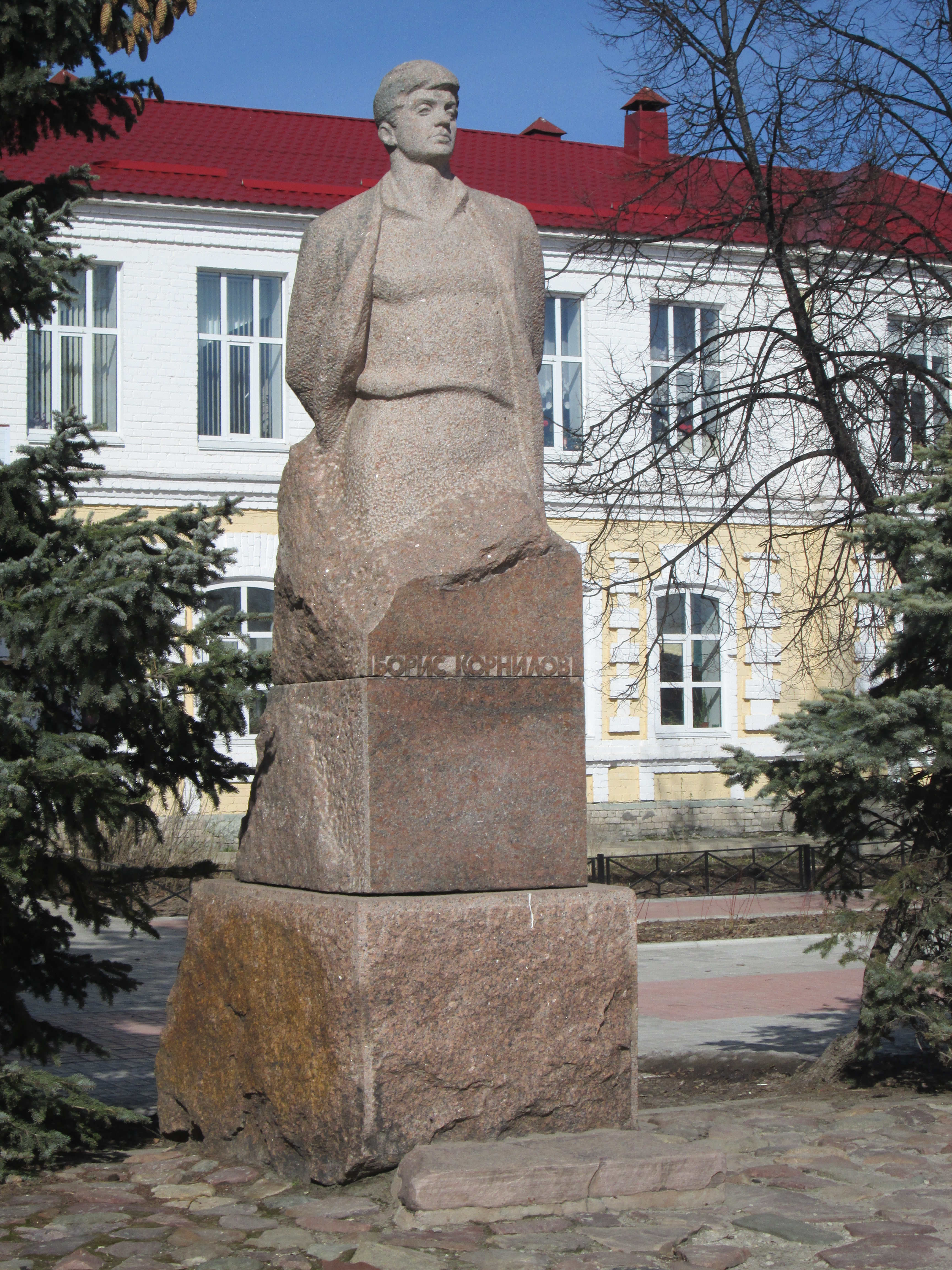 г. Семенов. Памятник поэту Борису Корнилову.